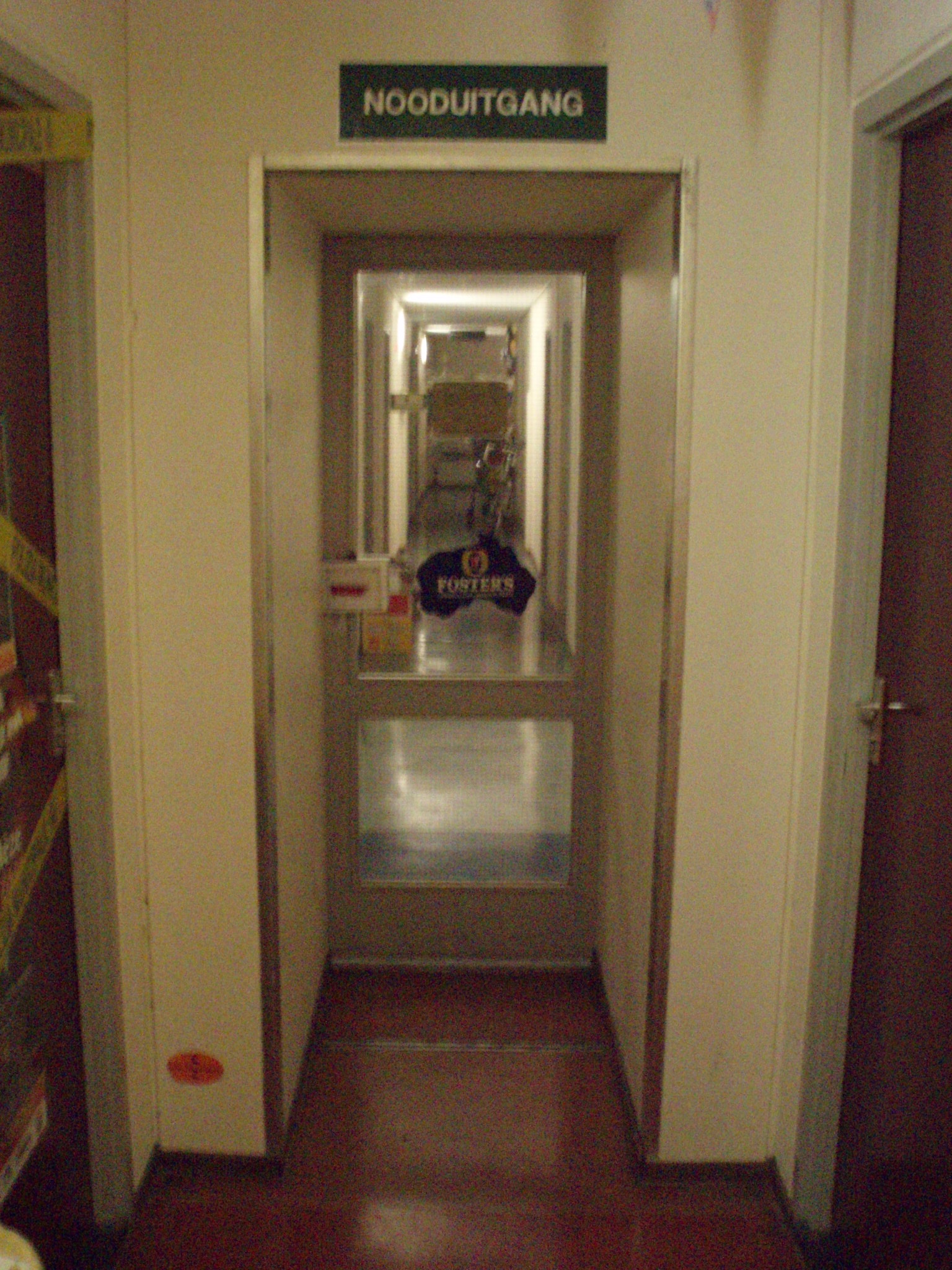 eigen foto (c) 2006 looi